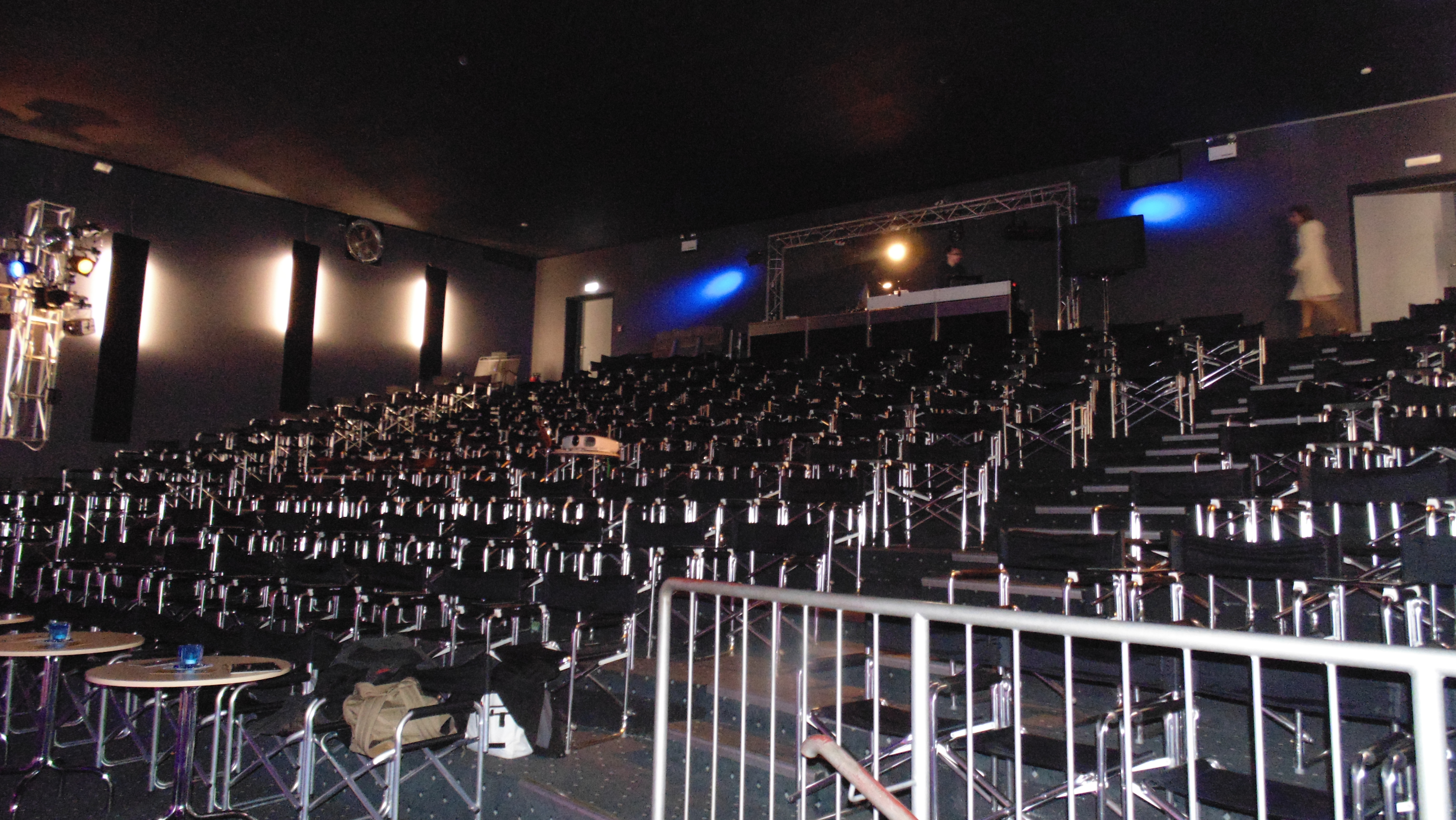 Blick in den Zuschauerraum von Bühne / Eingangsberich